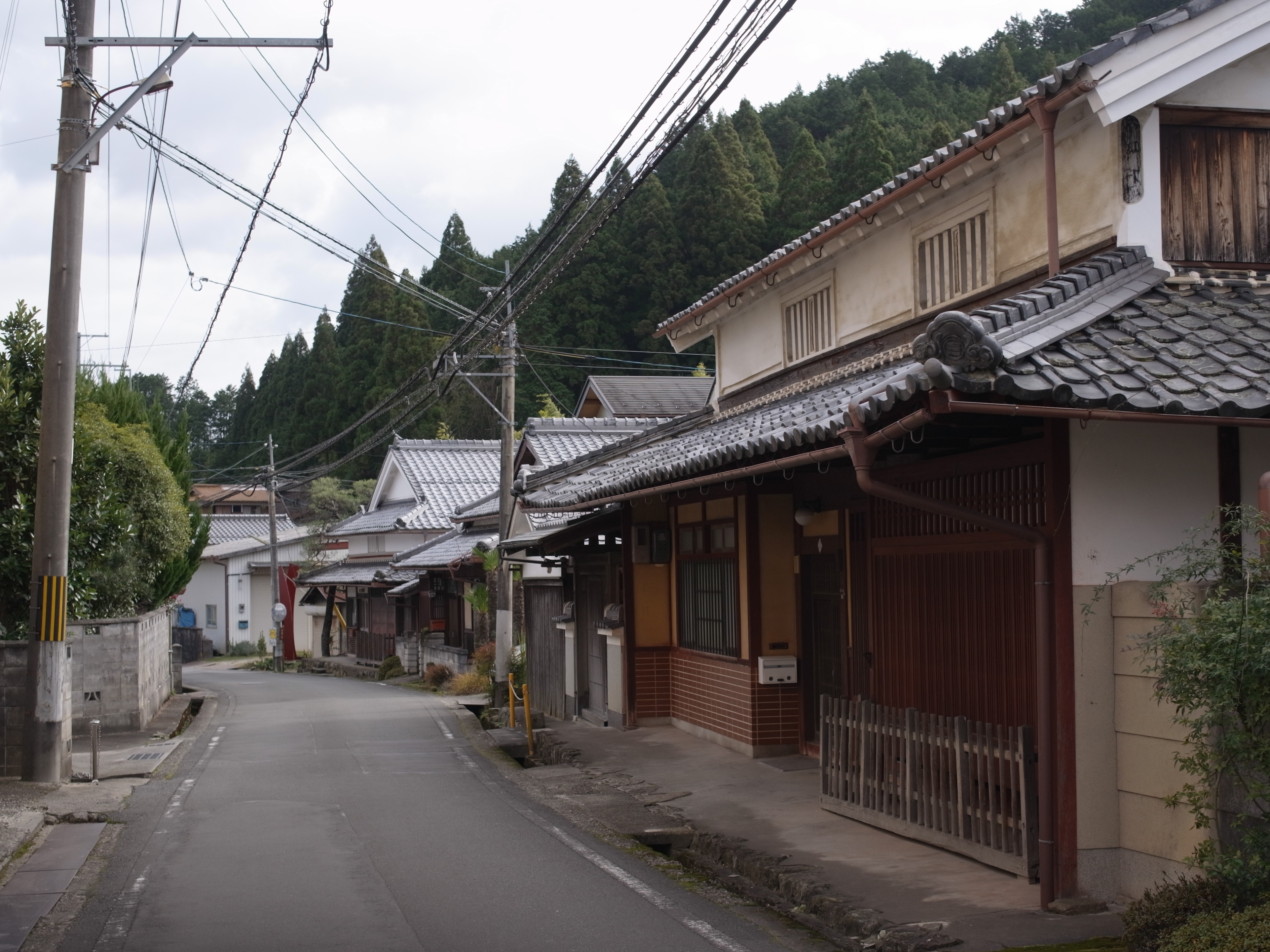 埴生の中心部